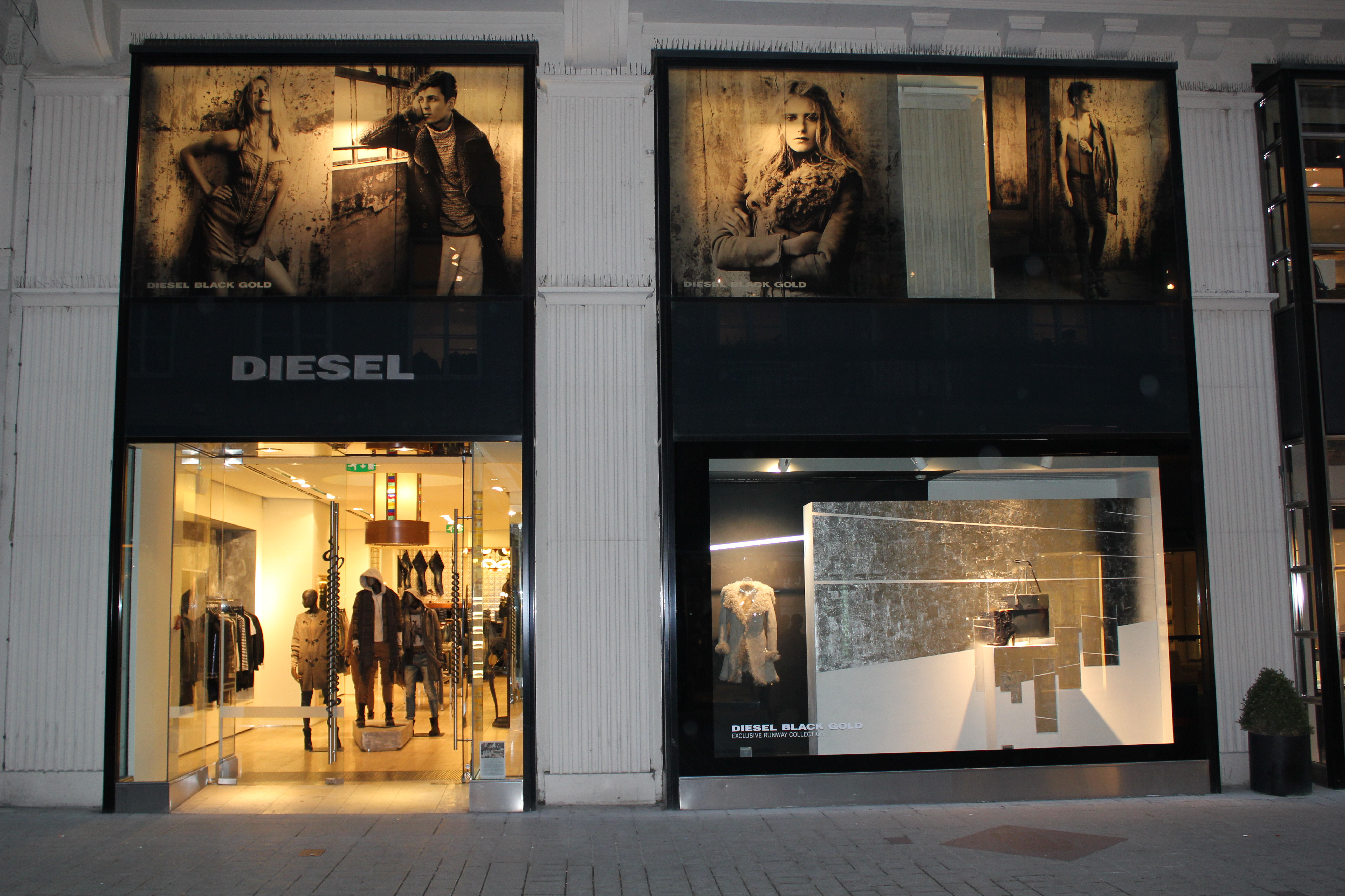 Diesel Black Gold in Wien